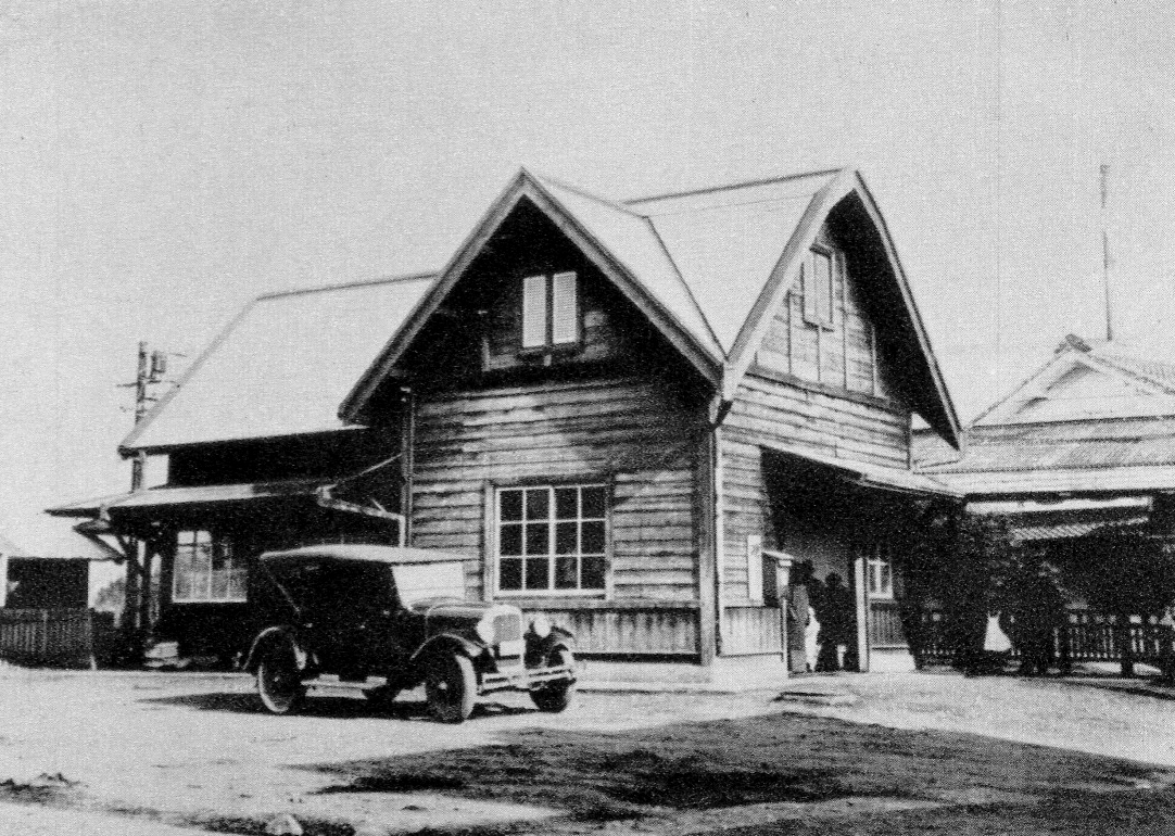 昭和5年頃の犬山口駅前